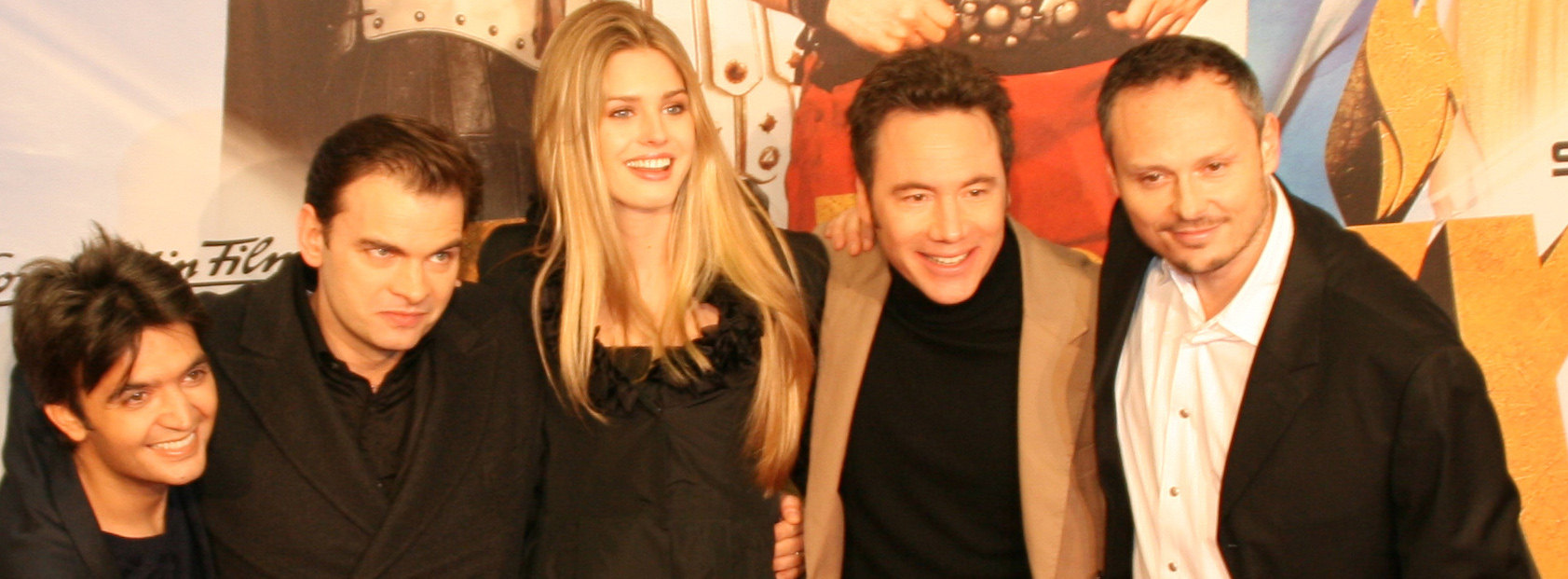 Regisseur Thomas Langmann, Schauspieler Clovis Cornillac, „Alice“ alias Vanessa Hessler, Comedian Michael „Bully“ Herbig und Regisseur Frederic Forestier (v.l.) posieren bei der Filmpremiere von "Asterix bei den Olympischen Spielen" in München.